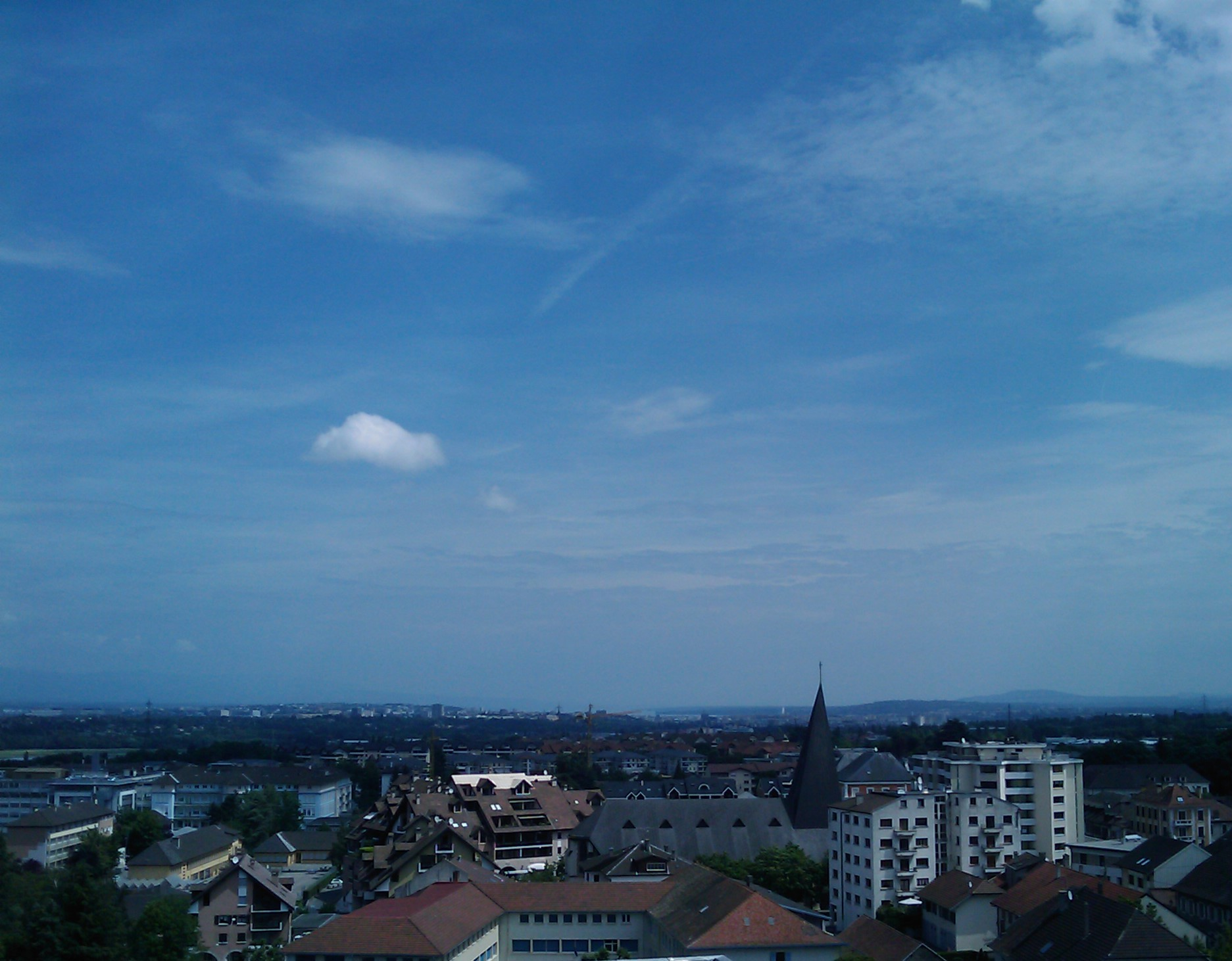 Panorma de Saint-Julien-en-Genevois avec Genève à l'arrière-plan.